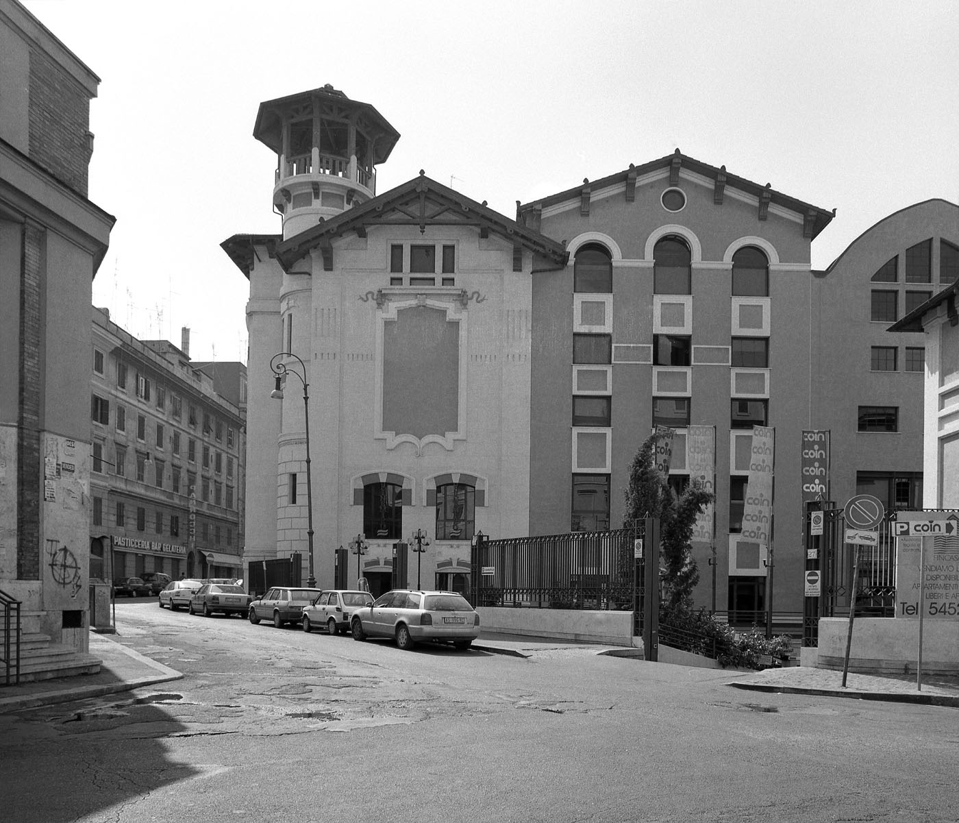 Ex-stabilimento Birra Peroni, Piazza Alessandria, Roma